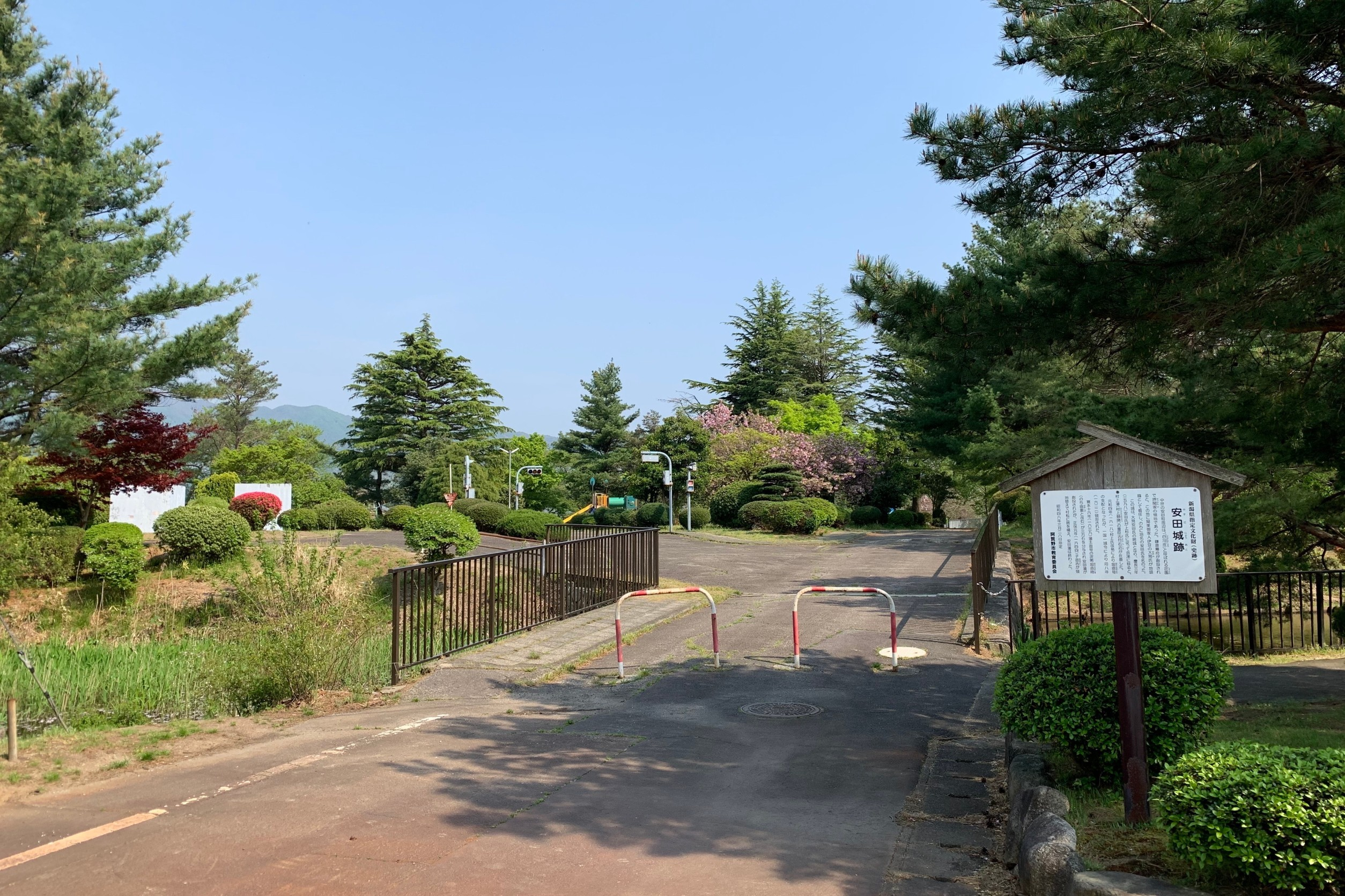 安田城跡。交通公園になっている（新潟県阿賀野市，2020年5月）